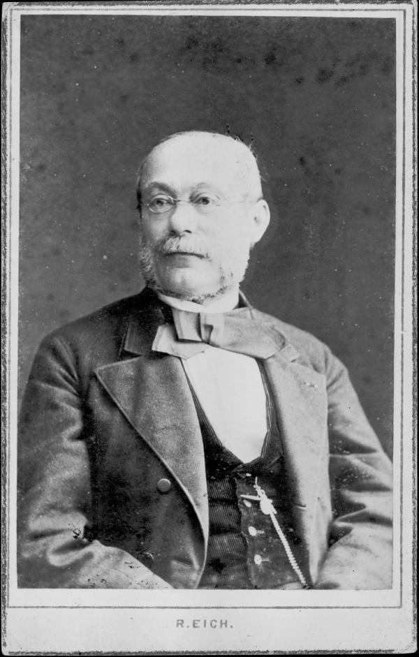 Moritz Fürstenau (* 26. Juli 1824; † 27. März 1889), deutscher Musiker und Musikhistoriker